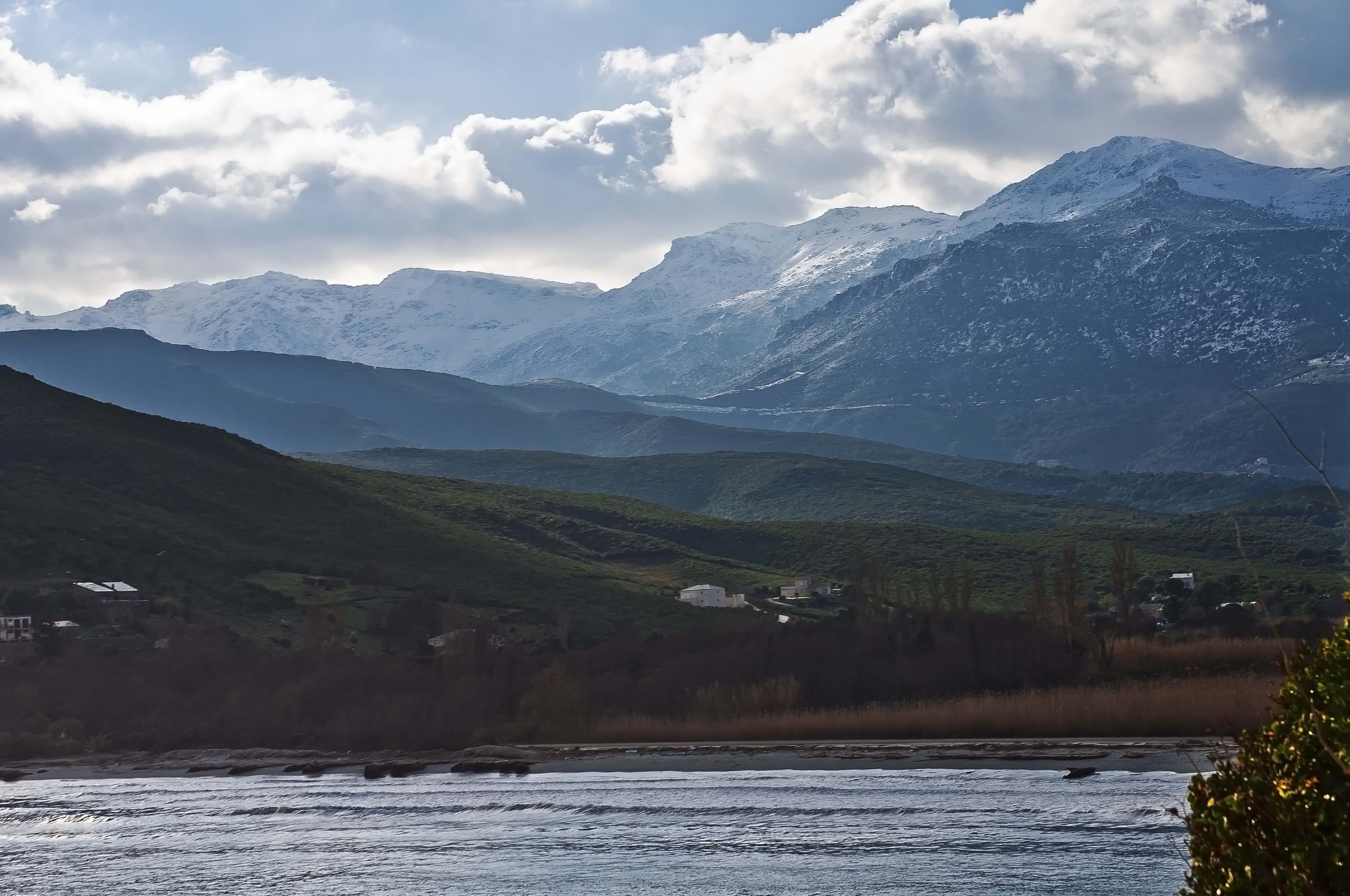 Vue hivernale depuis la plage de Pietracorbara.